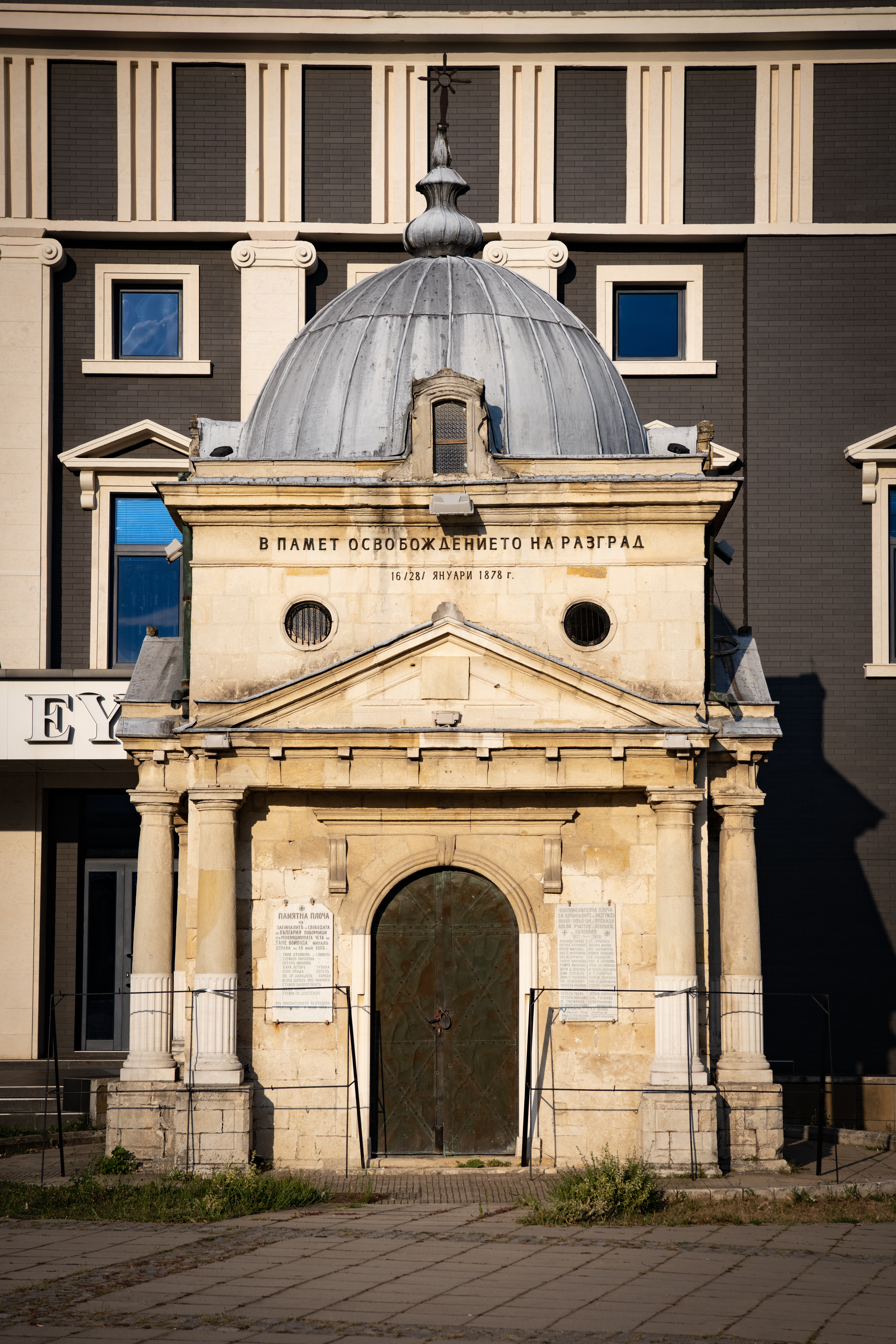 Снимката документира мавзолея костница в град Разград.